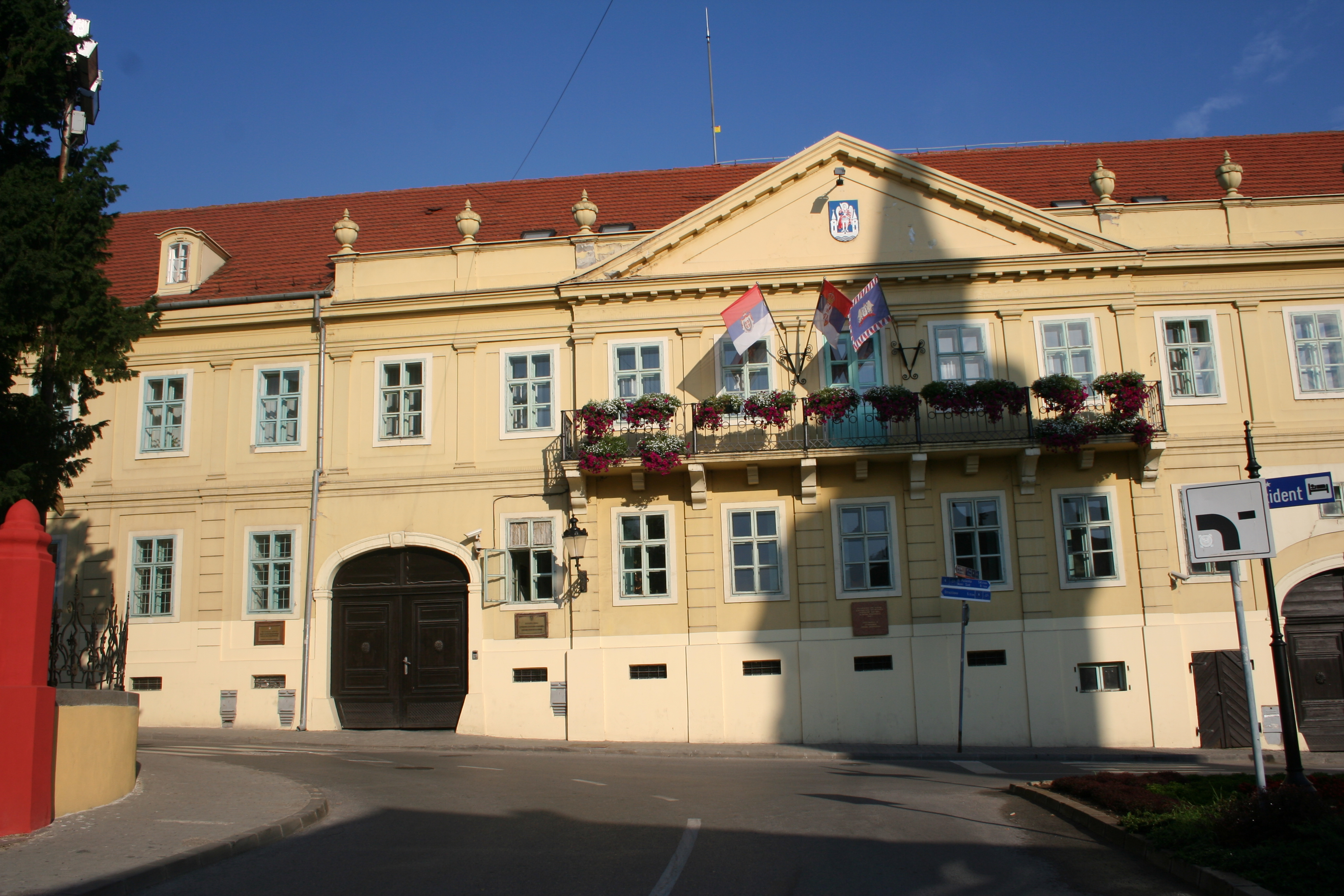 Magistrat - Gradska kuća